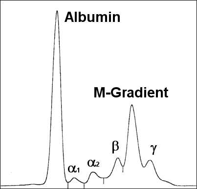 Serumelektrophorese IgA-Plasmozytom